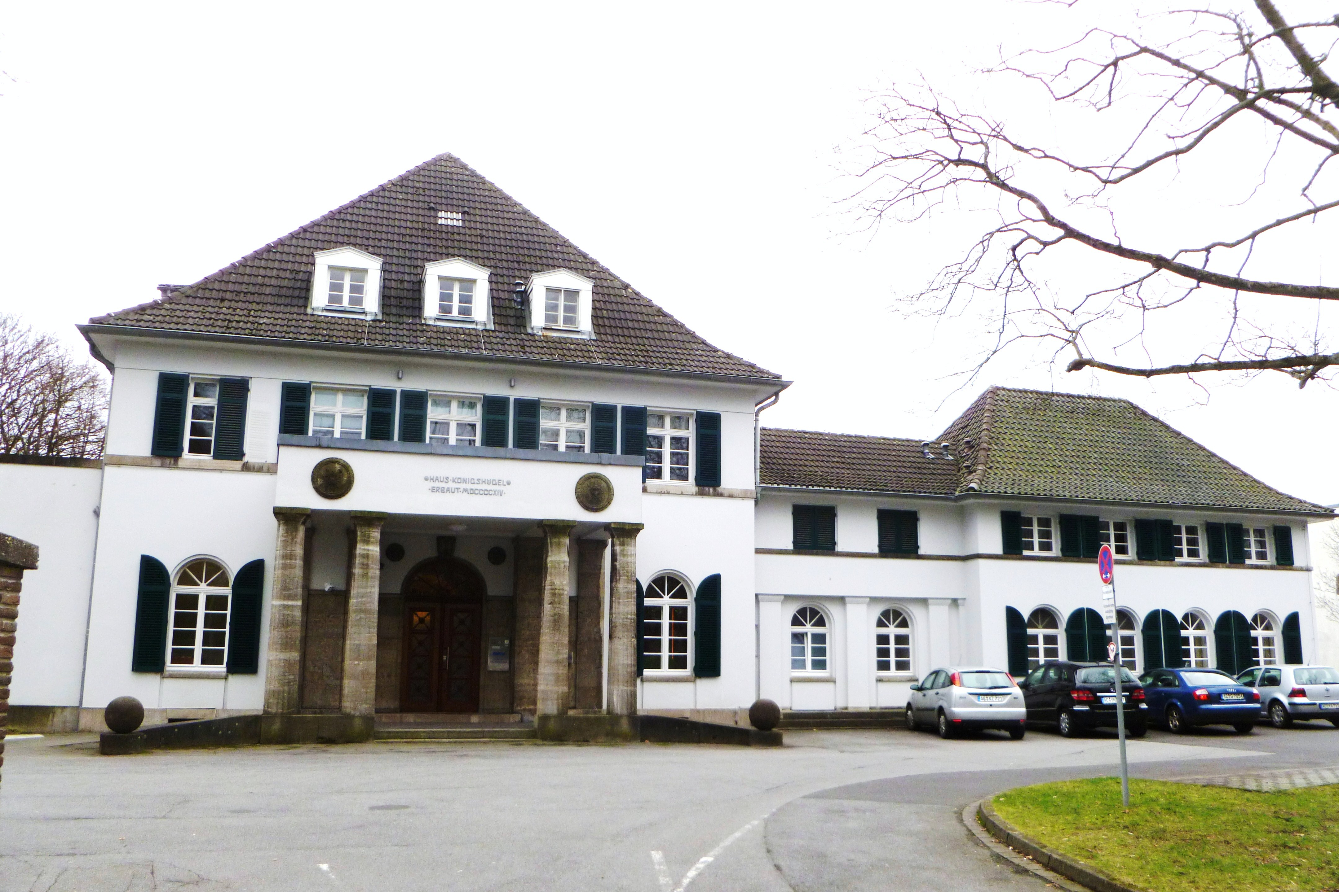 Baudenkmal in Aachen-Mitte; erbaut für den Nadelfabrikanten Lammertz; Architekt Carl Sieben; heute Gästehaus der RWTH Aachen